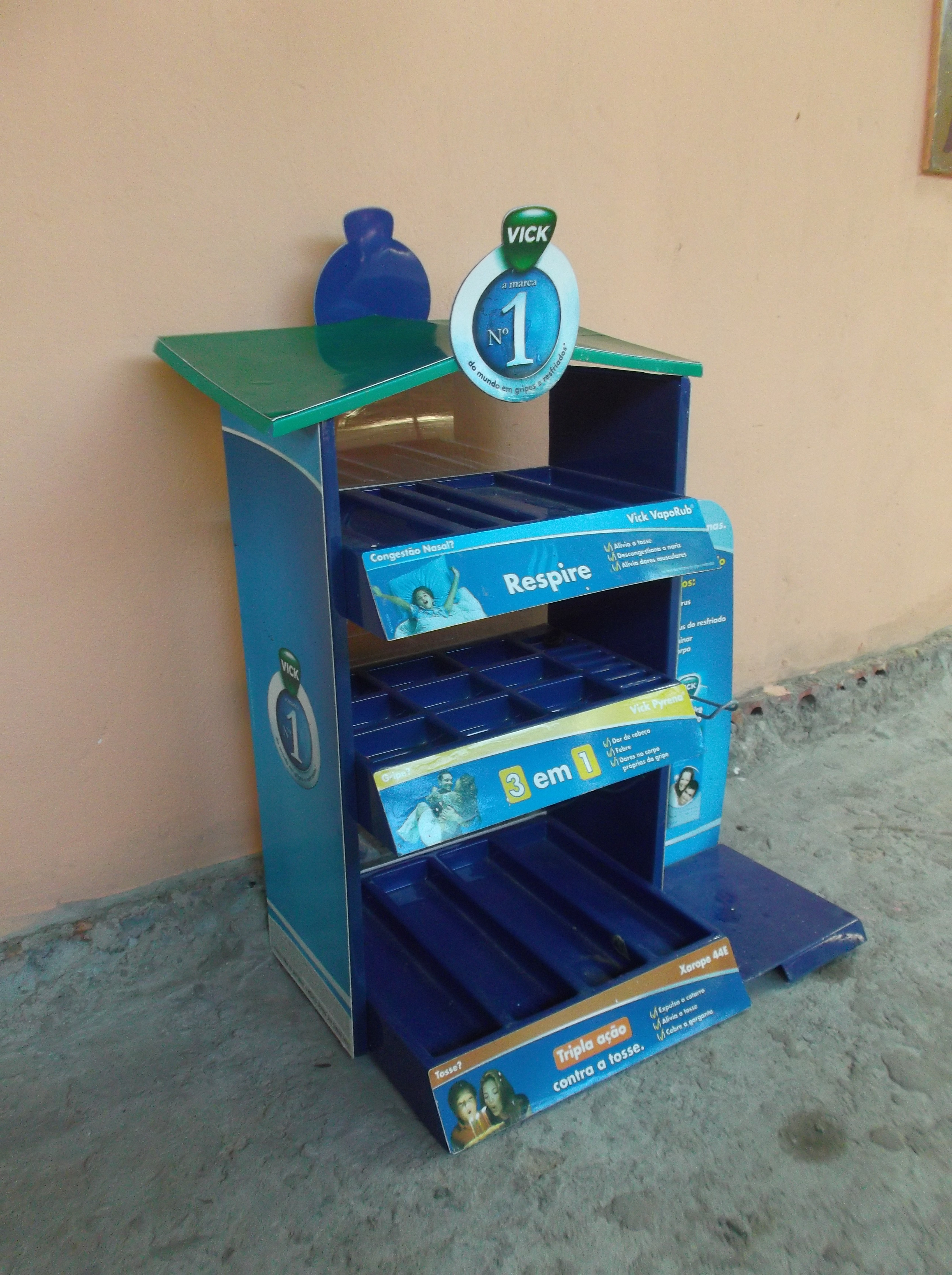 Casinha do produto Vick Vaporub no Brasil.